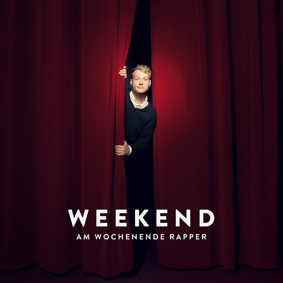 Cover des Albums „Am Wochenende Rapper“